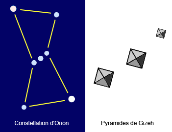 Comparaison approximative entre certaines pyramides d'Égypte et la constellation d'Orion pour illustrer une thèse selon laquelle les positions des pyramides seraient copiées sur le baudrier d'Orion.